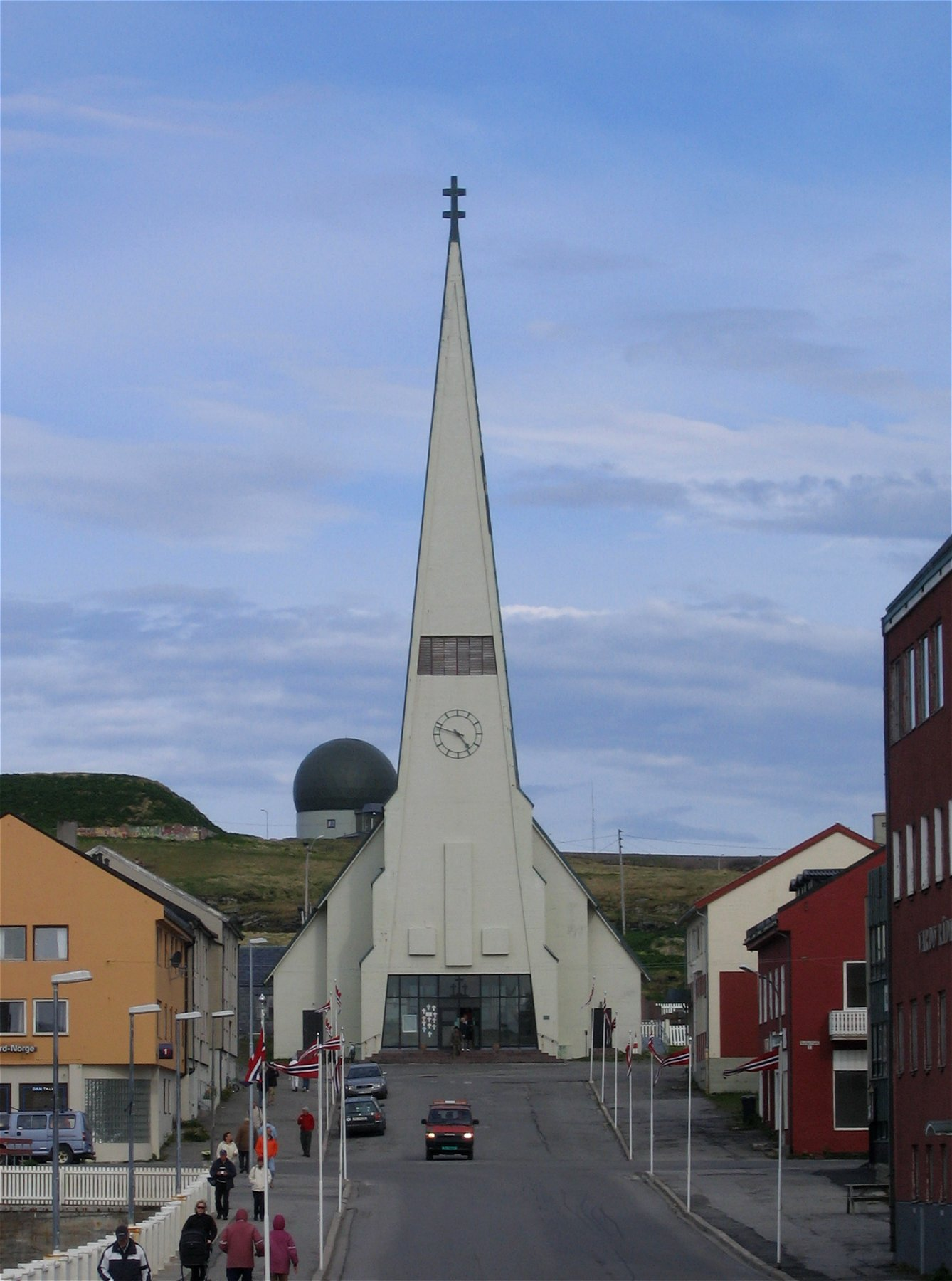 Kirche in Vardø, Norwegen